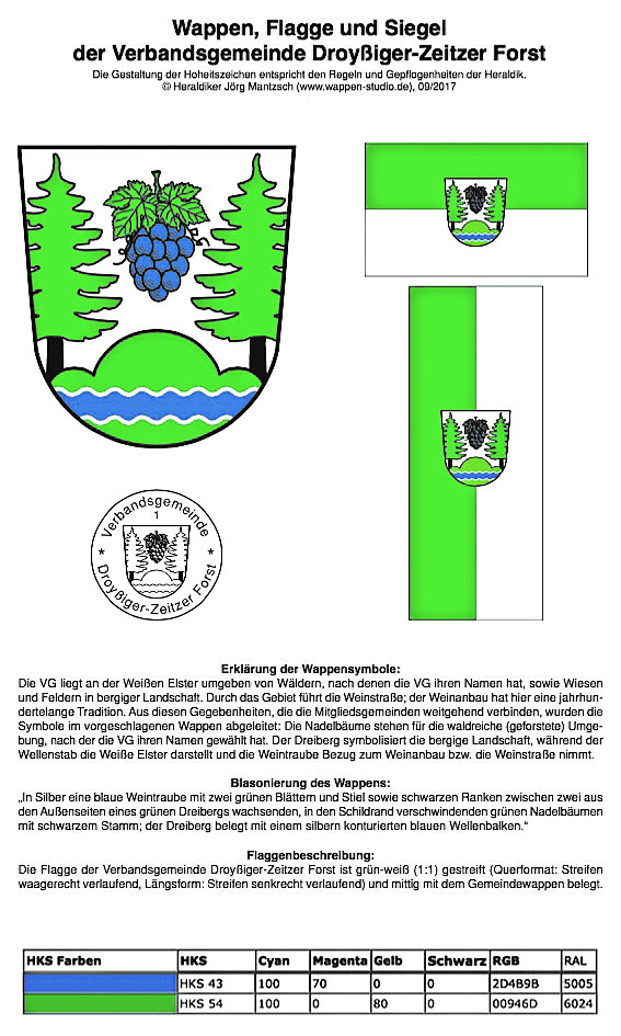 Wappen, Flaggen und Siegel der Verbandsgemeinde Droyßiger-Zeitzer-Forst und deren Erklärung